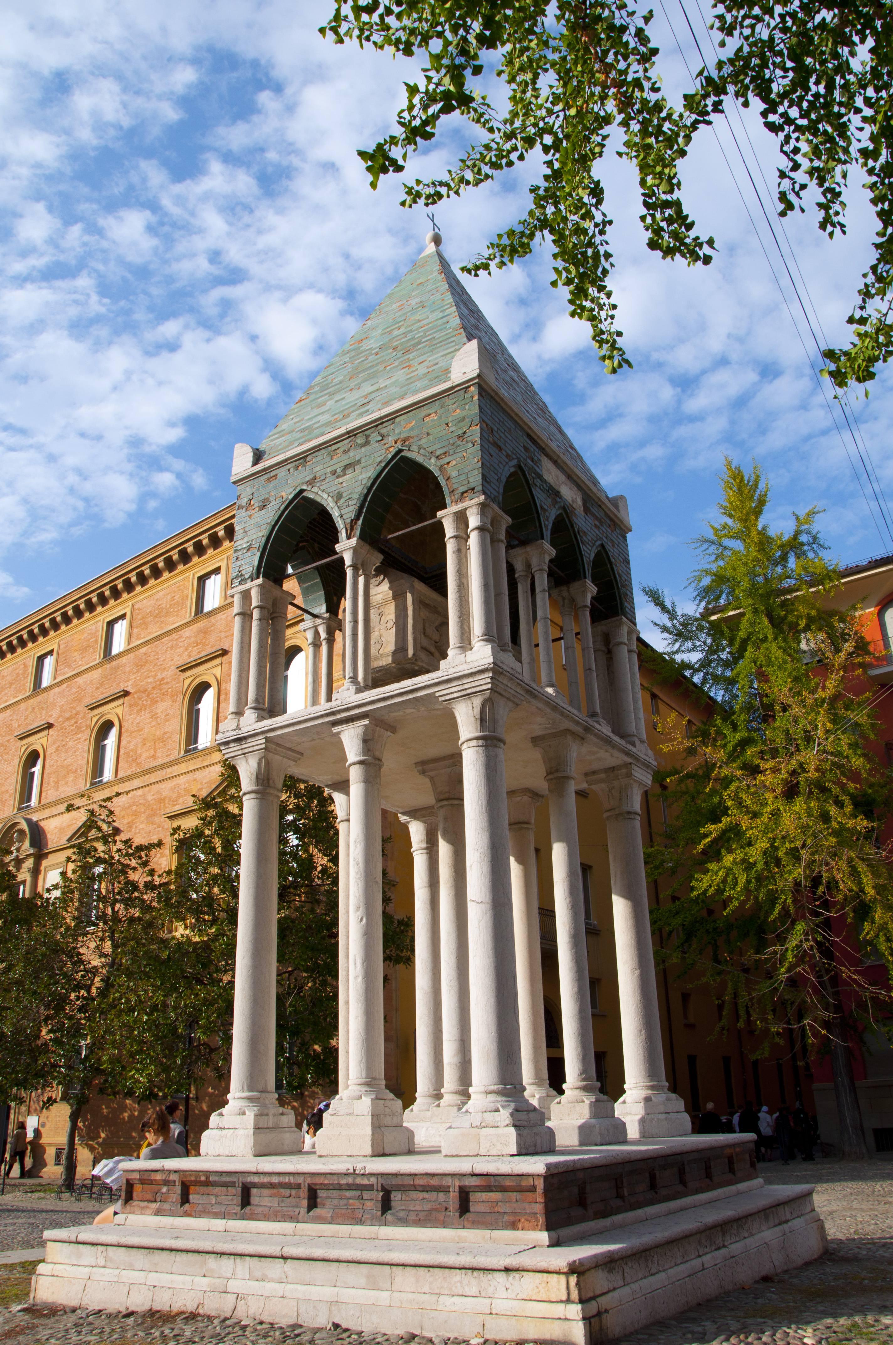 Piazza San Domenico - MIBAC This is a photo of a monument which is part of cultural heritage of Italy.